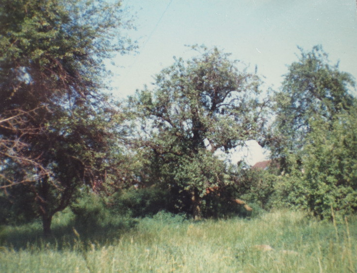 Turmhügelburg in Staffort